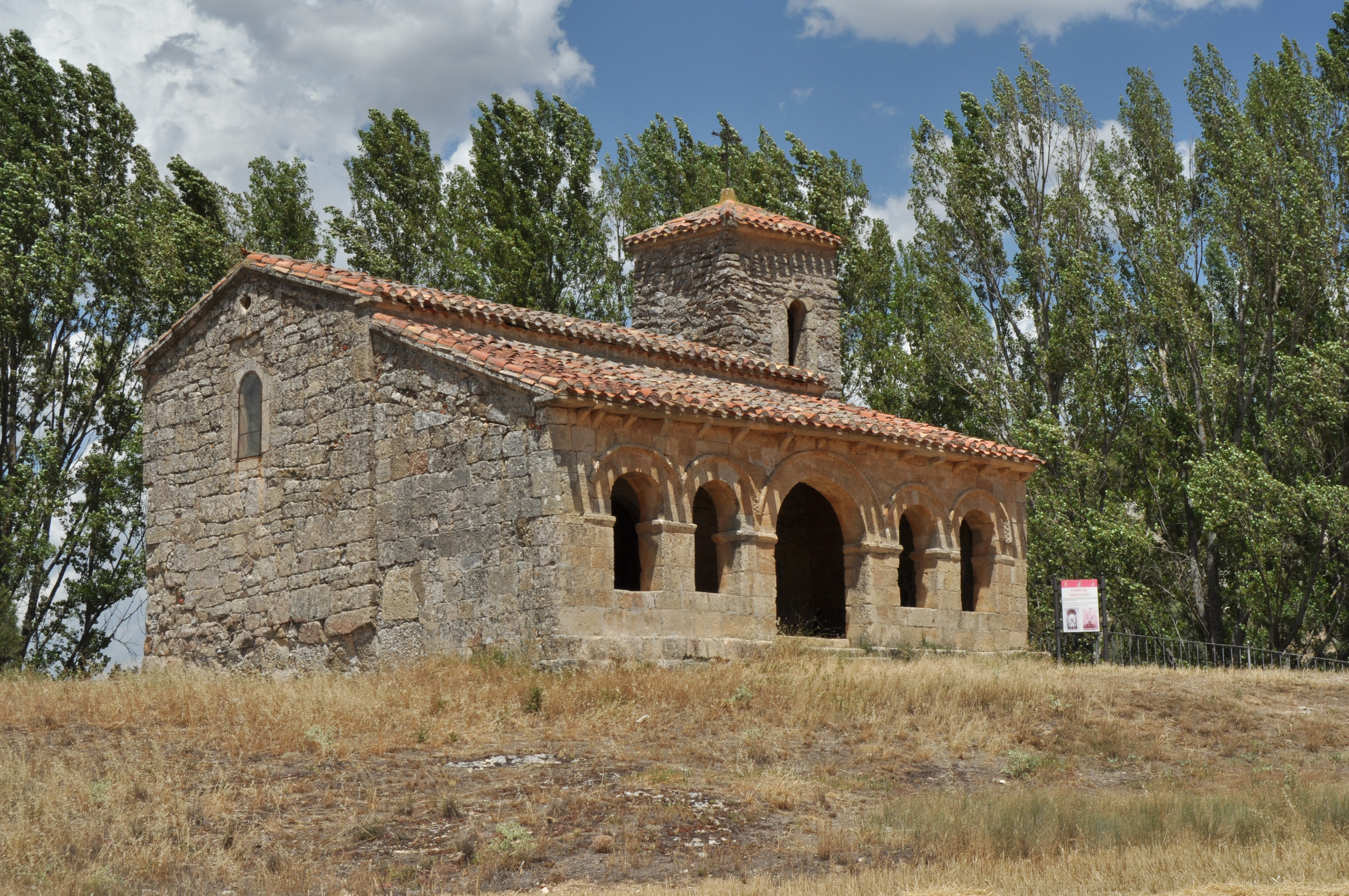 Santibañez del Val - 006